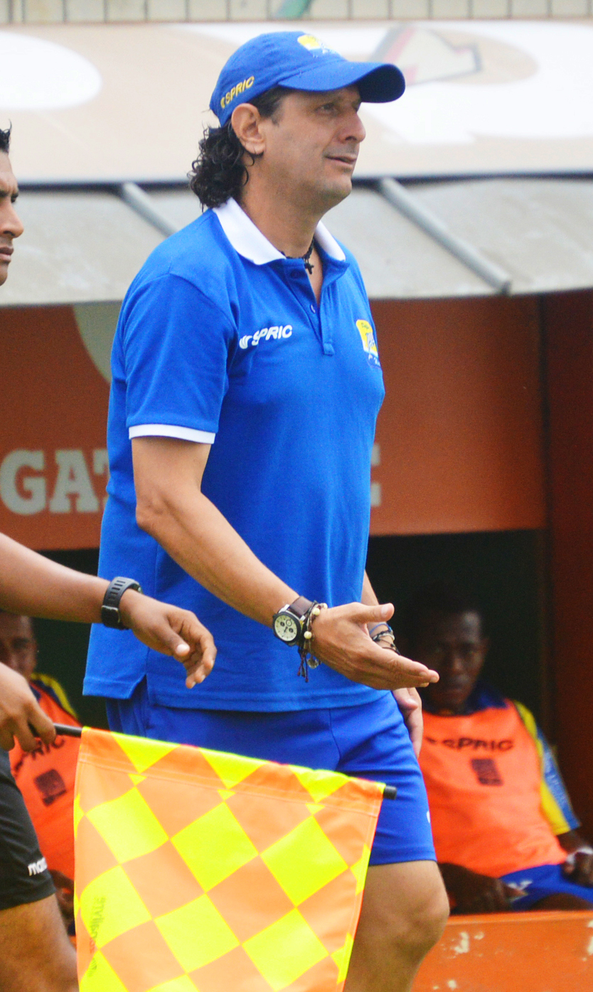 Raúl Duarte en Delfín Sporting Club de Manta en 2014